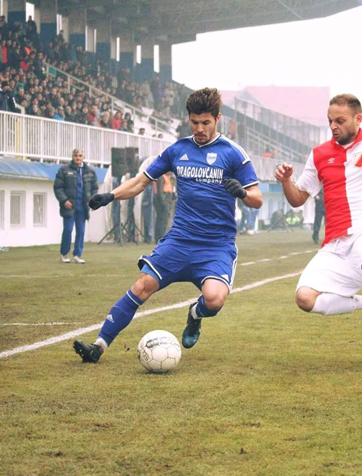 Српски (ћирилица): Стевановић на утакмици против Војводине